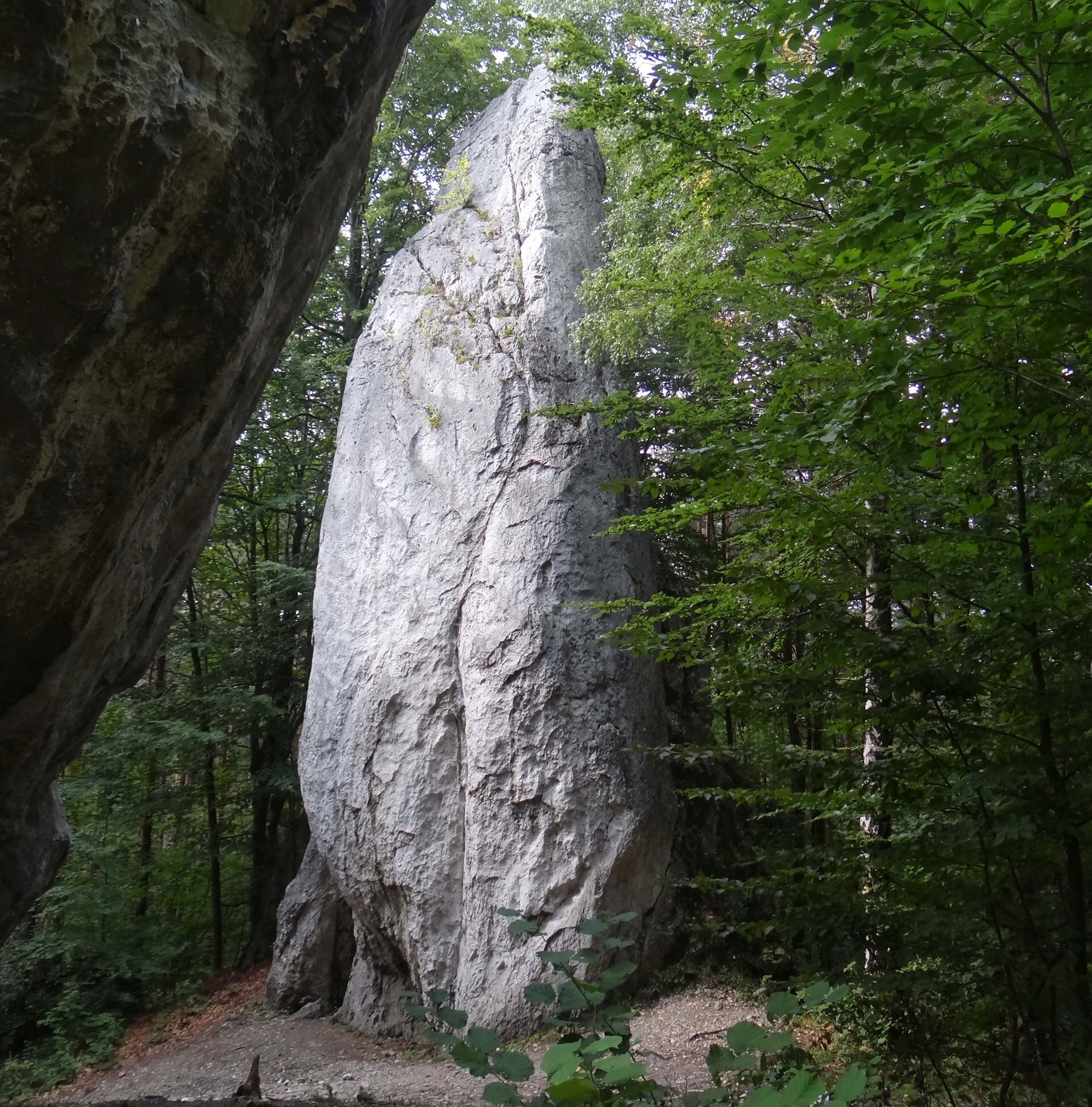 Skała Płętwa (koło Popielarki w Morsku)